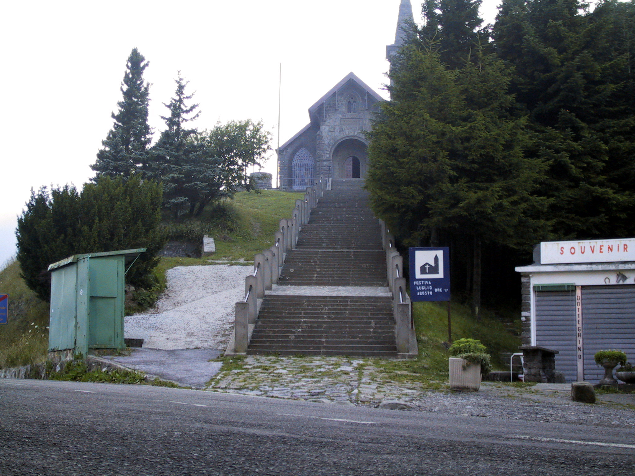 Santuario sul Passo della Cisa